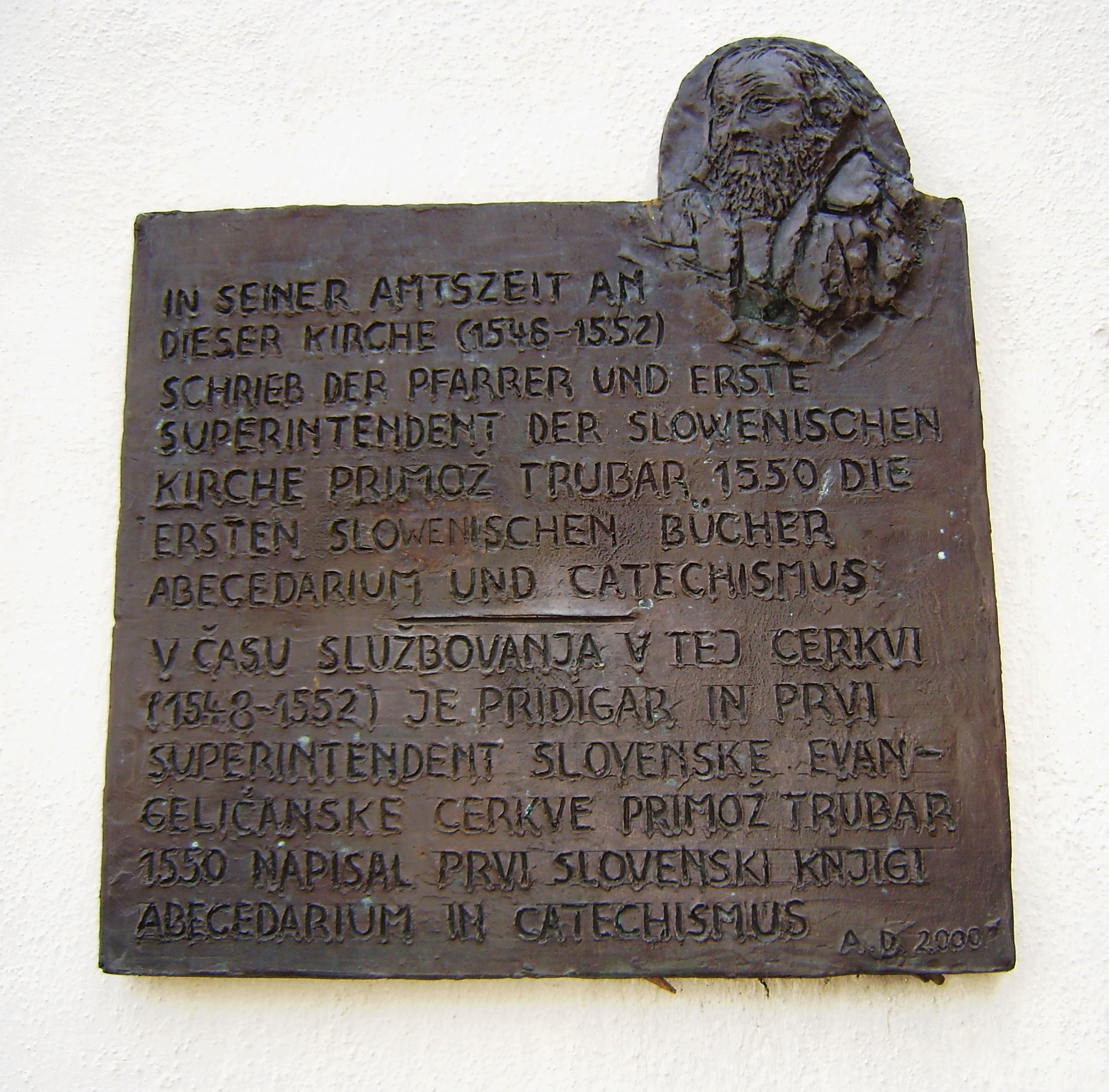 Primož Trubar je v Rothenburgu napisal prvi dve slovenski tiskani knjigi.